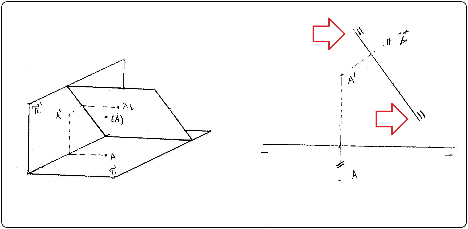 Exercício de Geometria Descritiva, Mudança de plano horizontal de ponto.